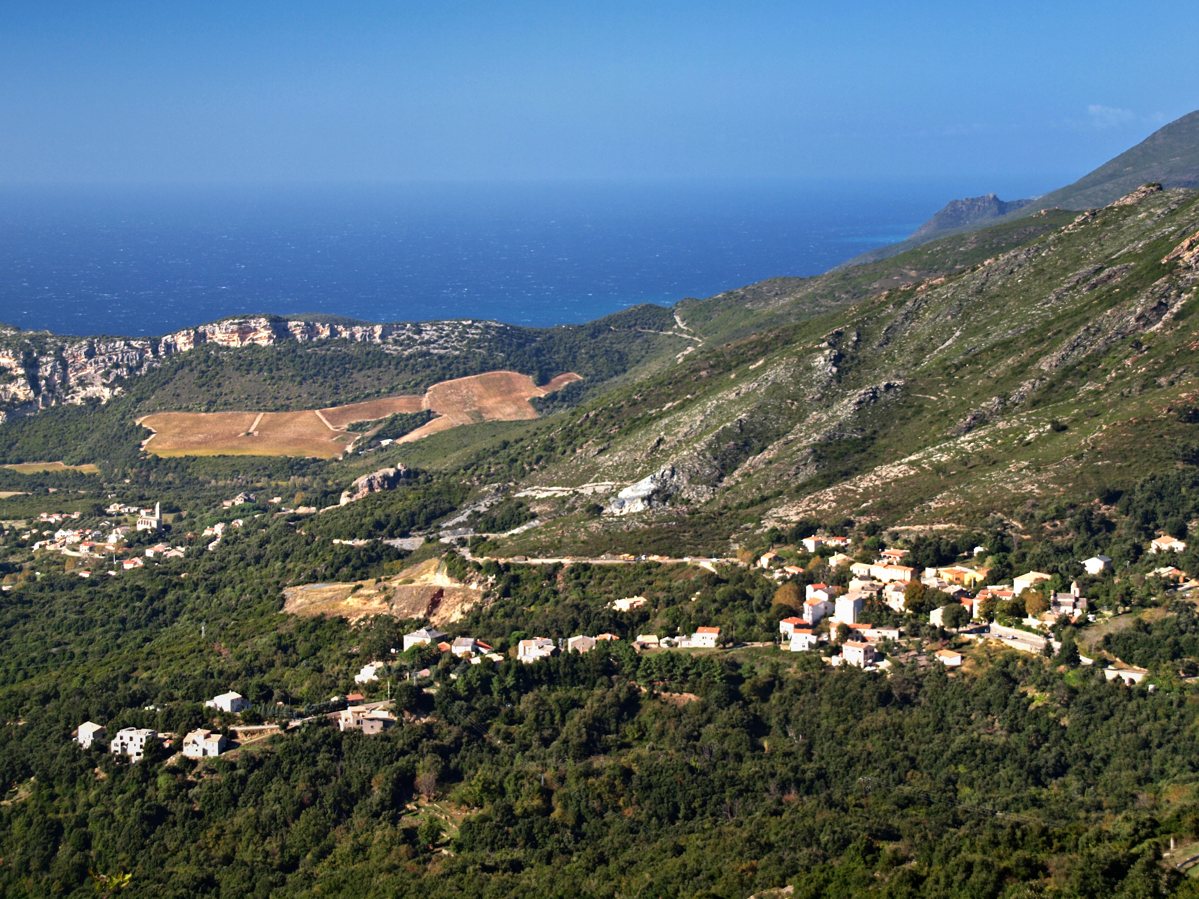 Barbaggio (Corse) - Vue du village. En bas, à gauche, Patrimonio